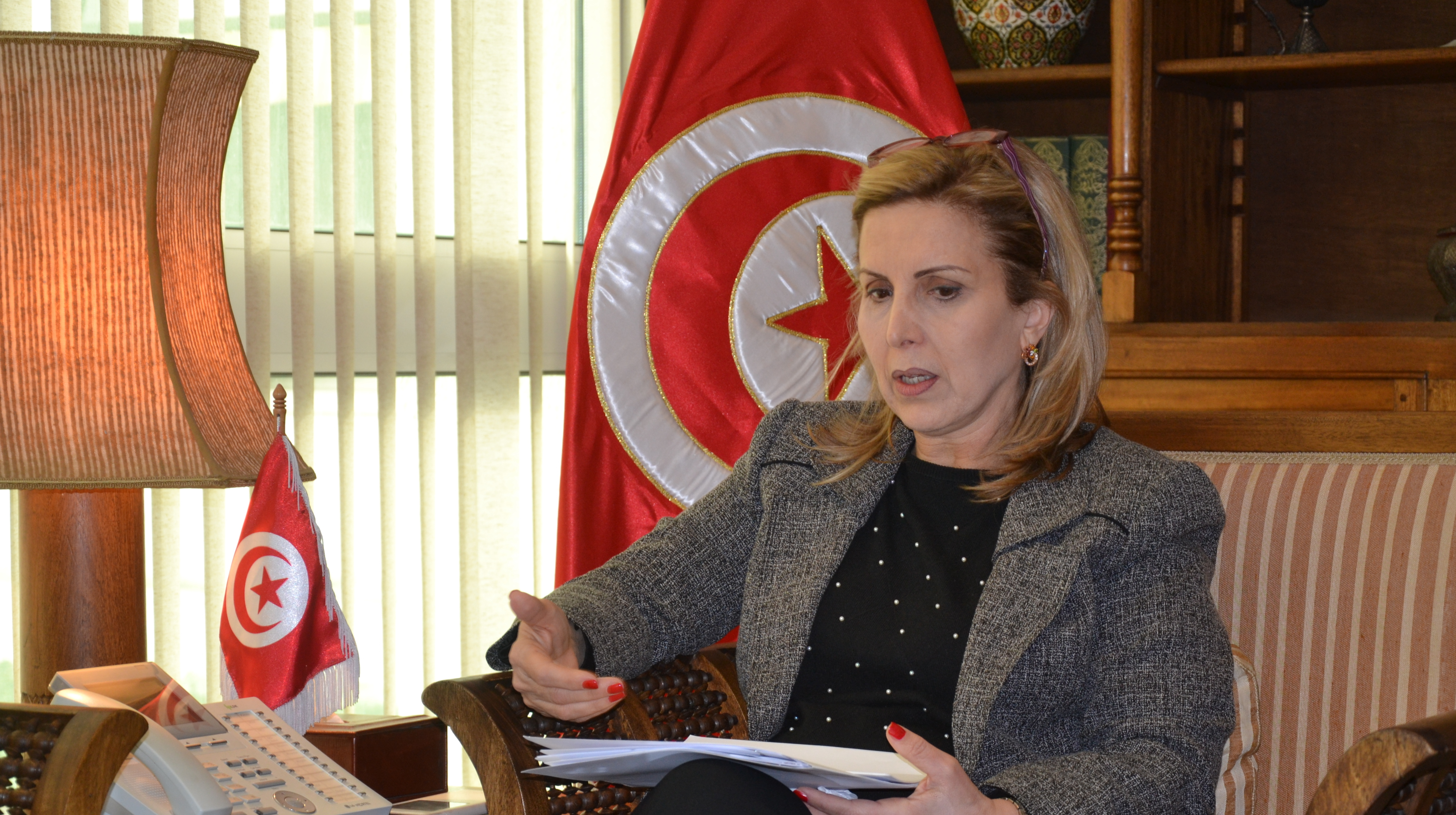 ministre du tourisme bureau selma elloumi